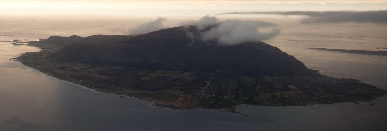 Flemsøya/Skuløya/Longva sett frå fly i søraust